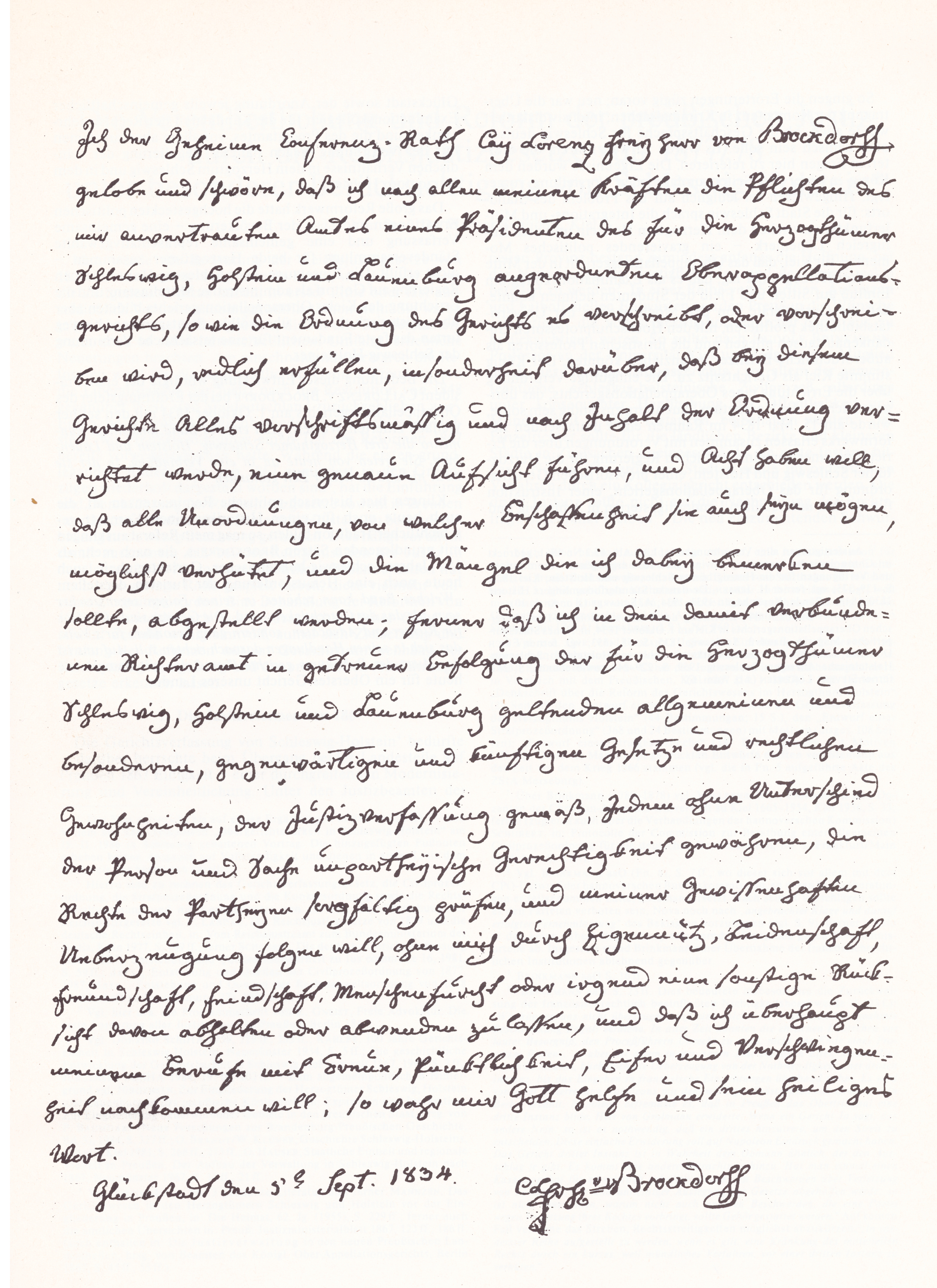 Amtseid von Cai Lorenz von Brockdorff als erster Präsident des Schleswig-Holsteinischen Oberappellationsgerichts 1834